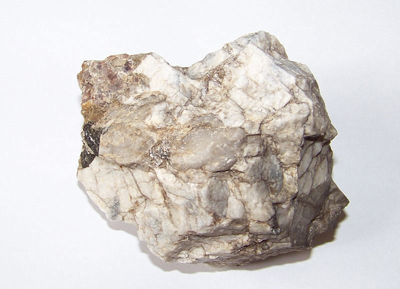 Andaluzyt (różowy) w pegmatycie anatektycznym Gór Sowich. Michałkowa, Dolny Śląsk, Polska.